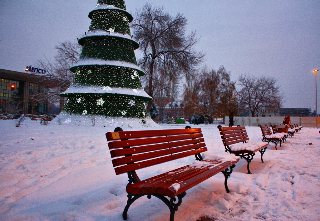 Skopje - Macedonia